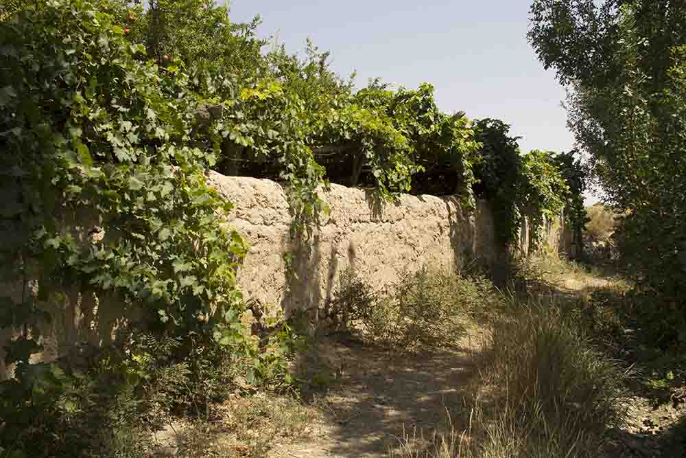 کوچه باغ شهرسرخه